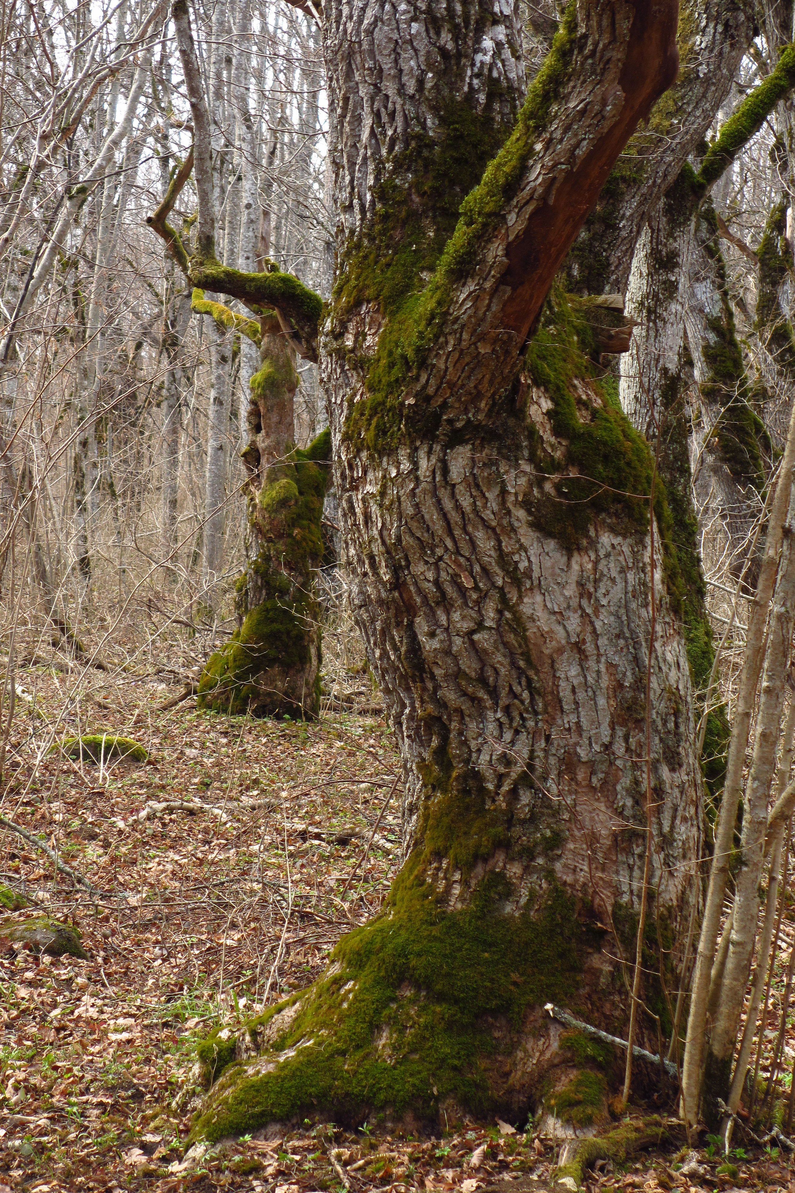 Lehmja tammik